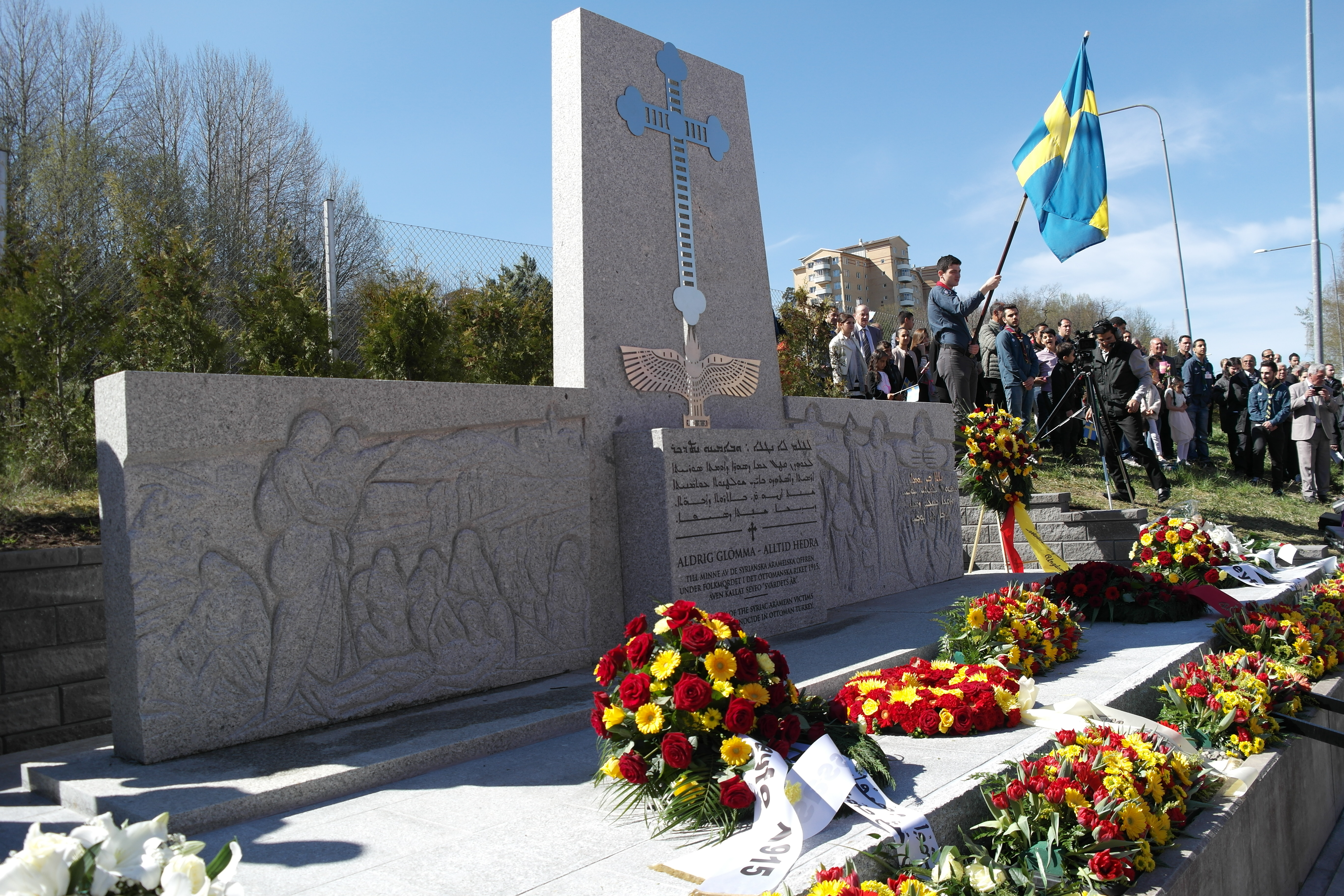 Syrianska minnesmonumentet dedikerat de syrianska offren under folkmordet 1915 i Ottomanska Turkiet. St Petrus & St Paulus Syrisk Ortodoxa kyrkan i Botkyrka